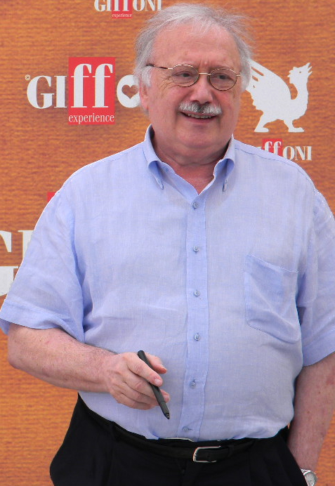 Gianni Minà al Giffoni Film Festival 2010